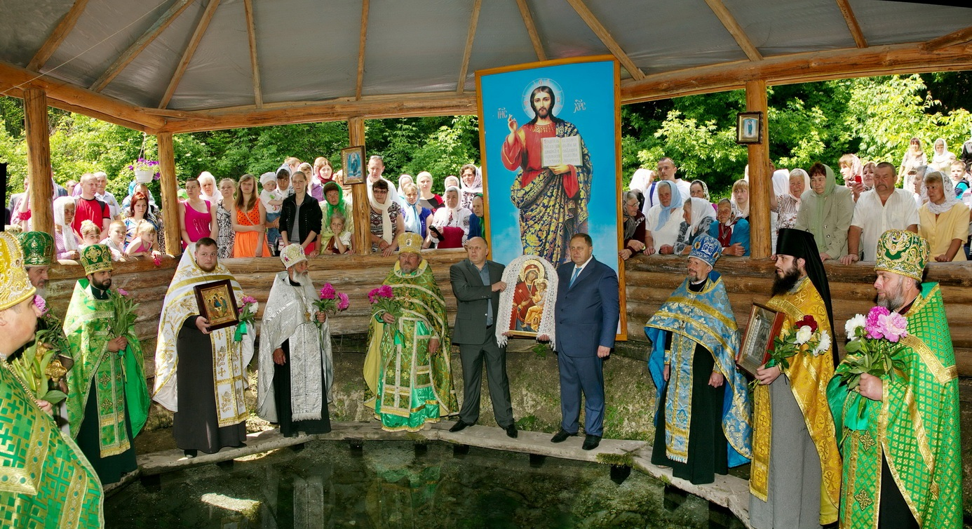 Праздничное богослужение на Источнике Святой Троицы